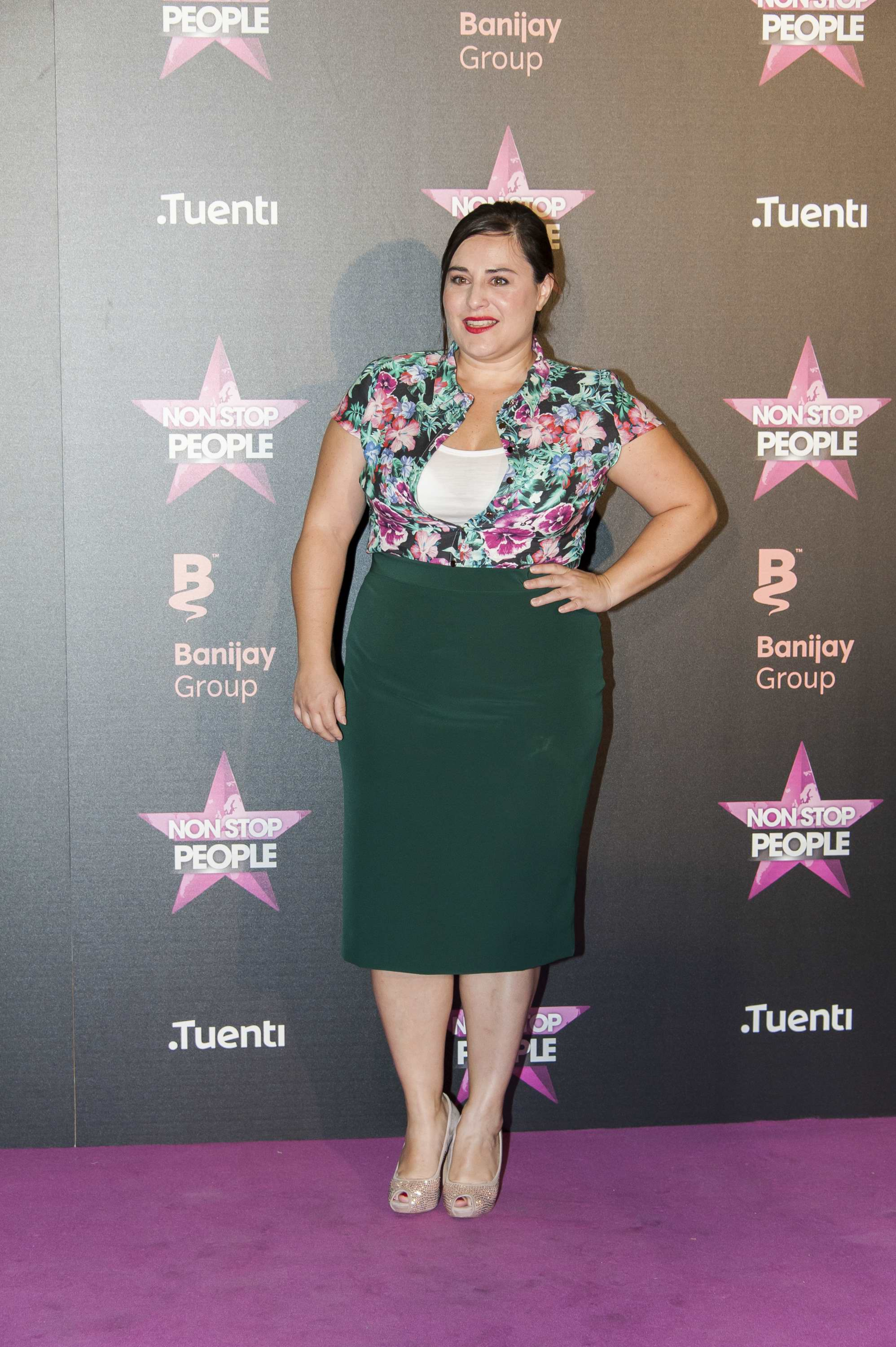 Fotos del photocall y fiesta de lanzamiento de un nuevo canal de televisión en España.